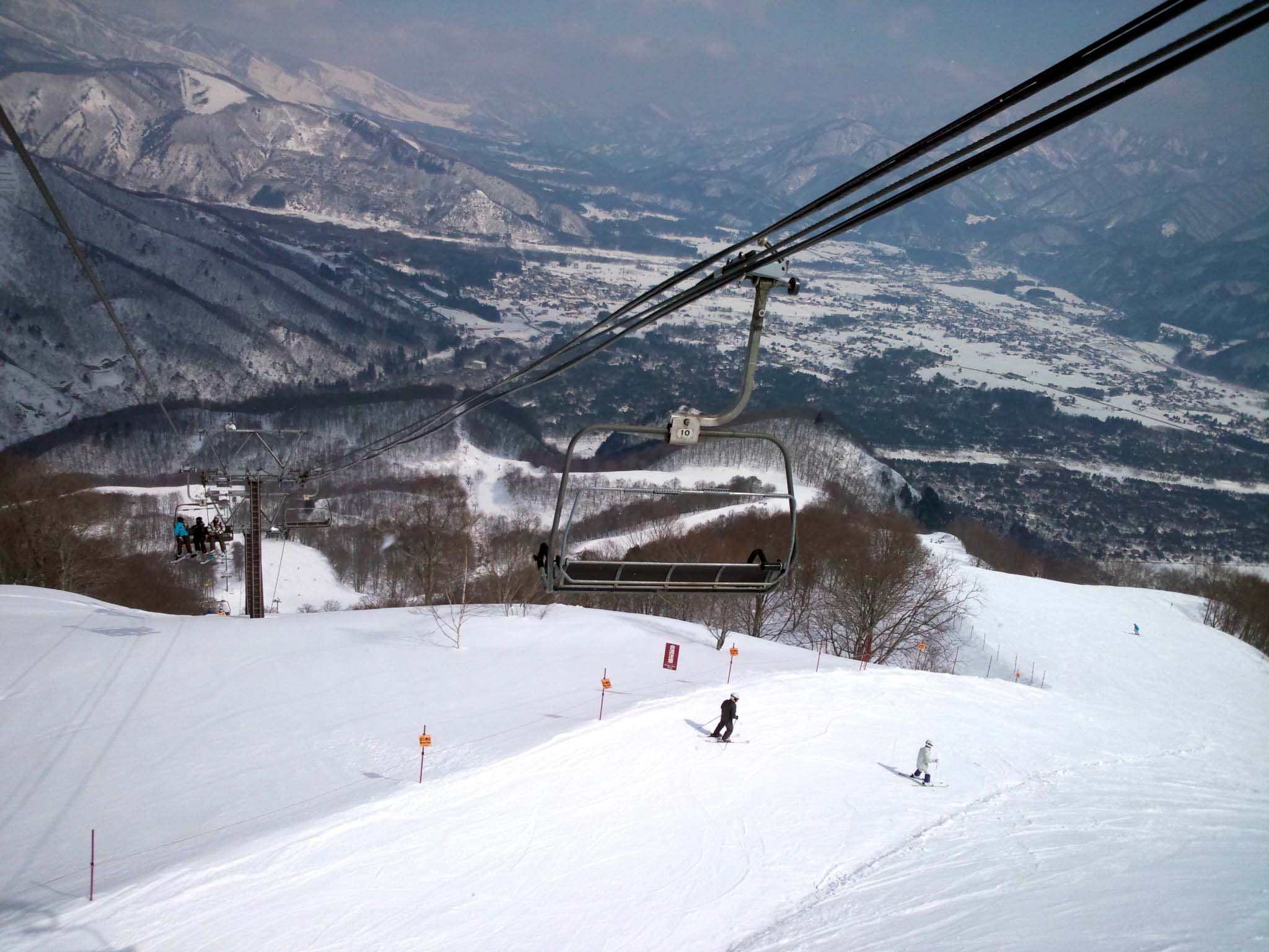 HAKUBA47 ルート１コース 私のスマートフォンF-12Cにて撮影